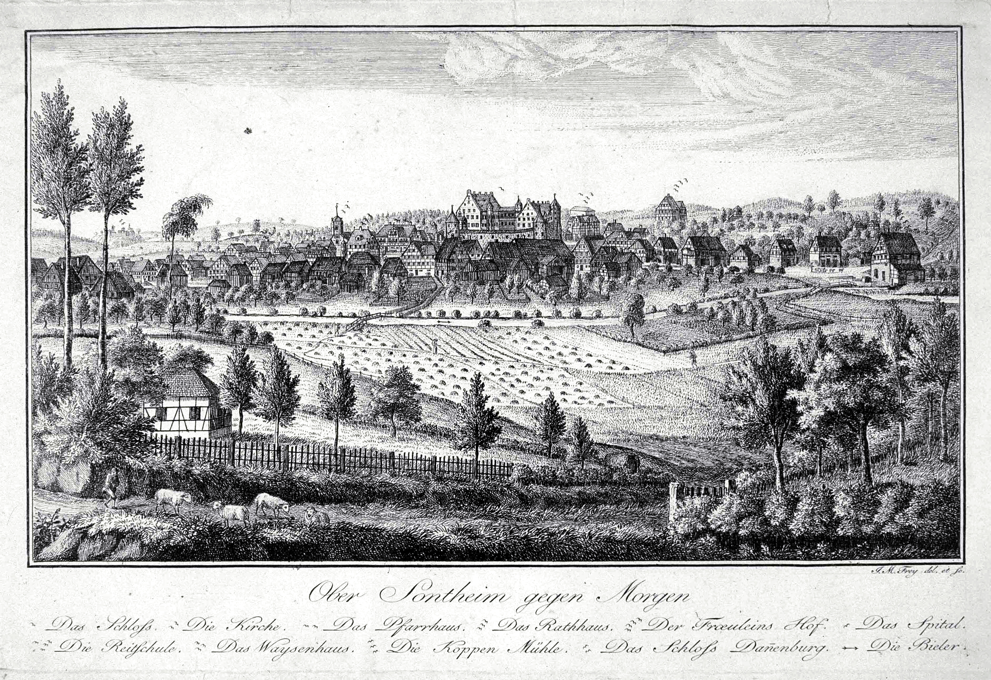 Obersontheim auf einem Kupferstich von J. M. Frey, 18. Jahrhundert (StAL JL 501 Nr. 26)